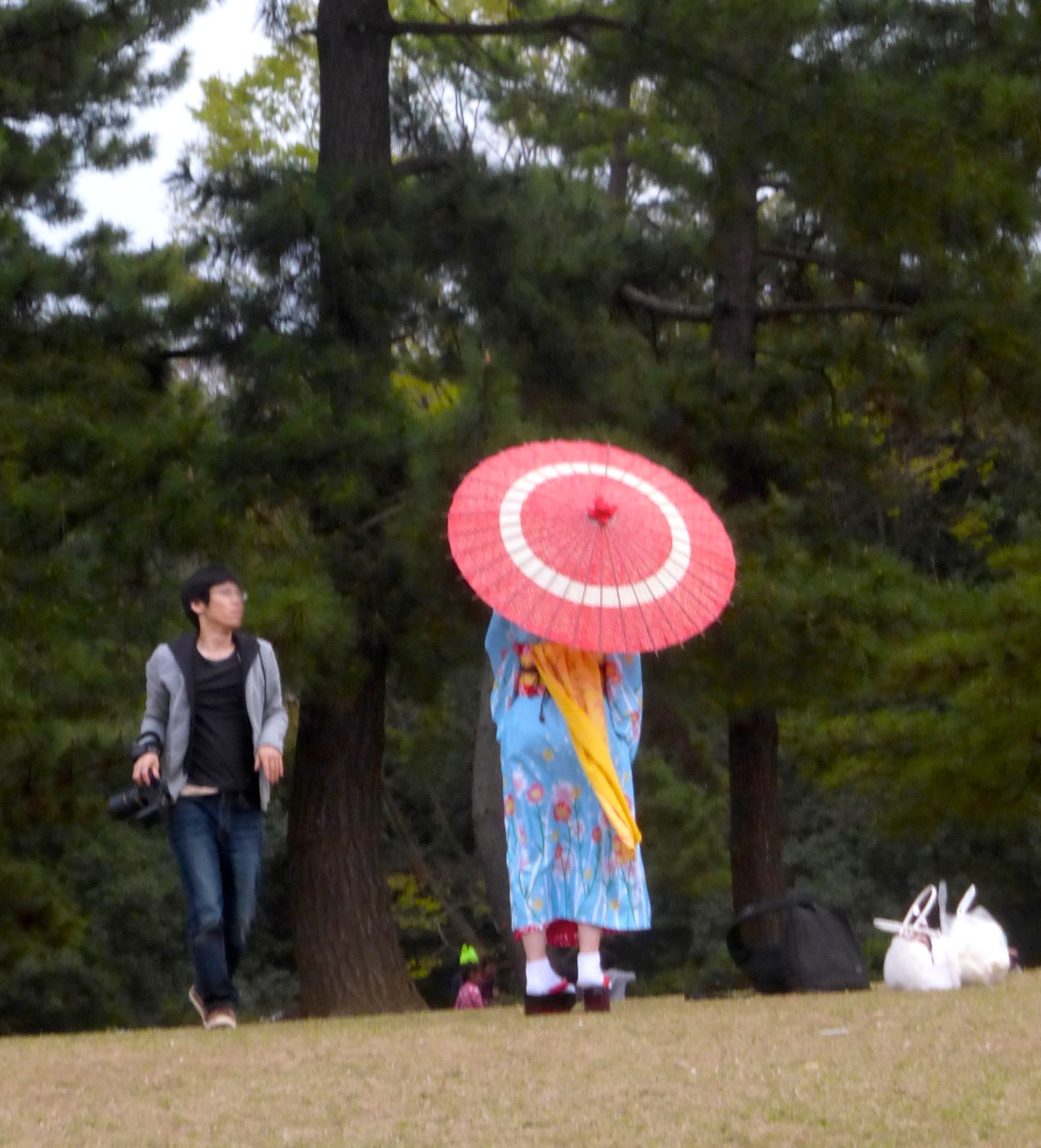 光が丘公園で蛇の目傘 (janome umbrella in Hikarigaoka park)